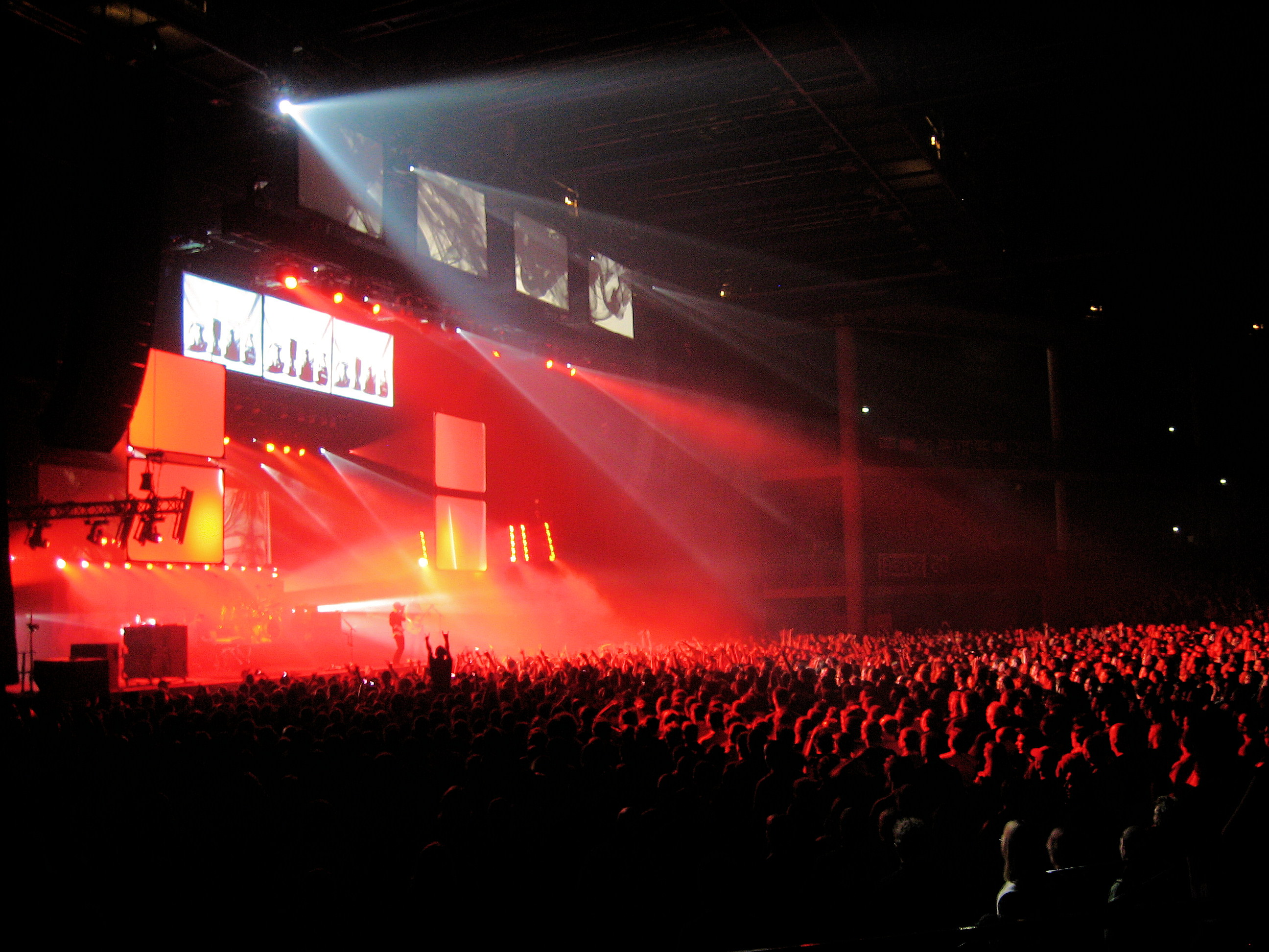 Le Zénith de Nantes (concert de Placebo le 4 décembre 2006). The Zenith of Nantes, France (Placebo live december 4th 2006)